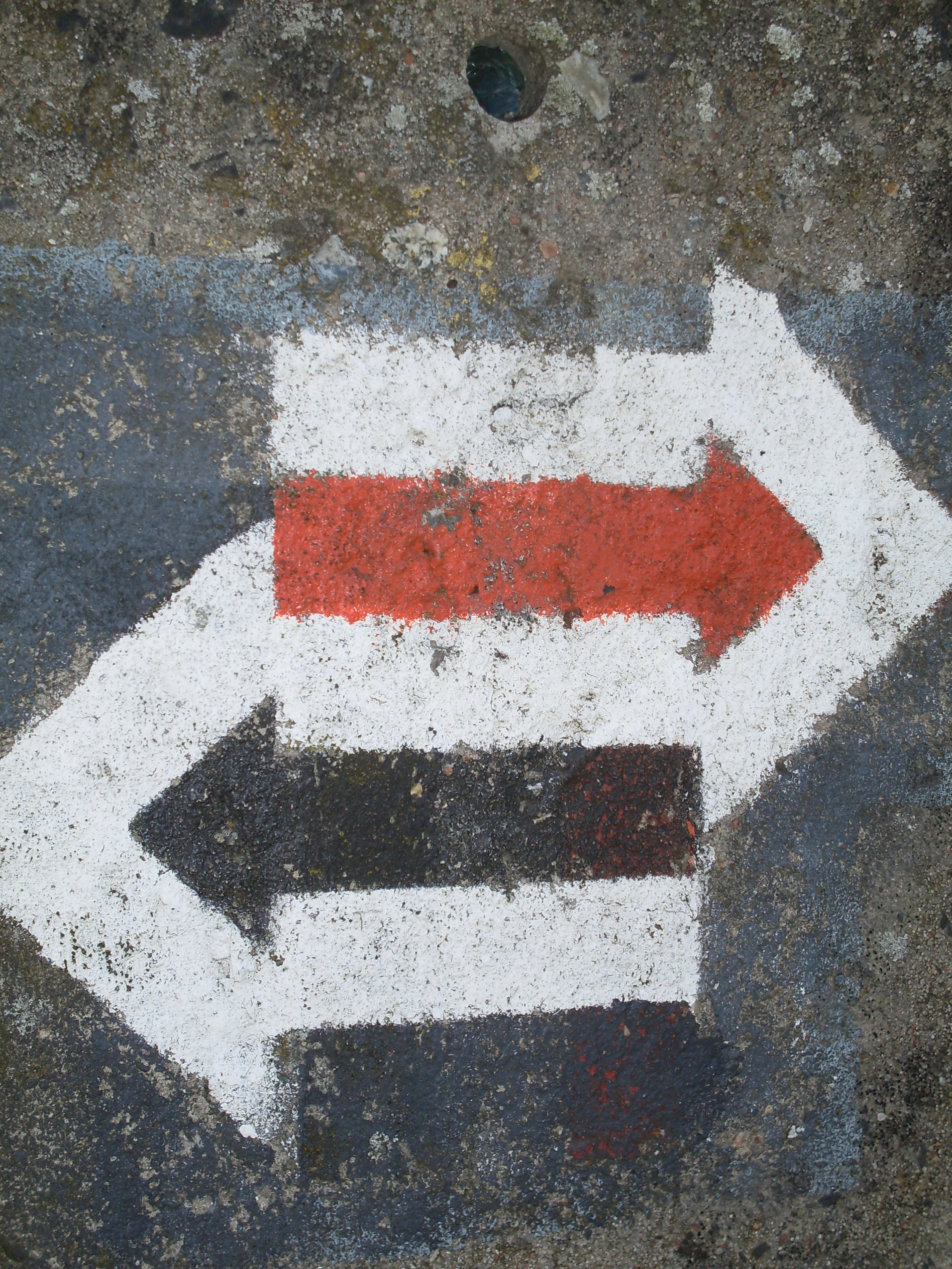 Oznaczenia szlaków PTTK w Tanowie koło Polic